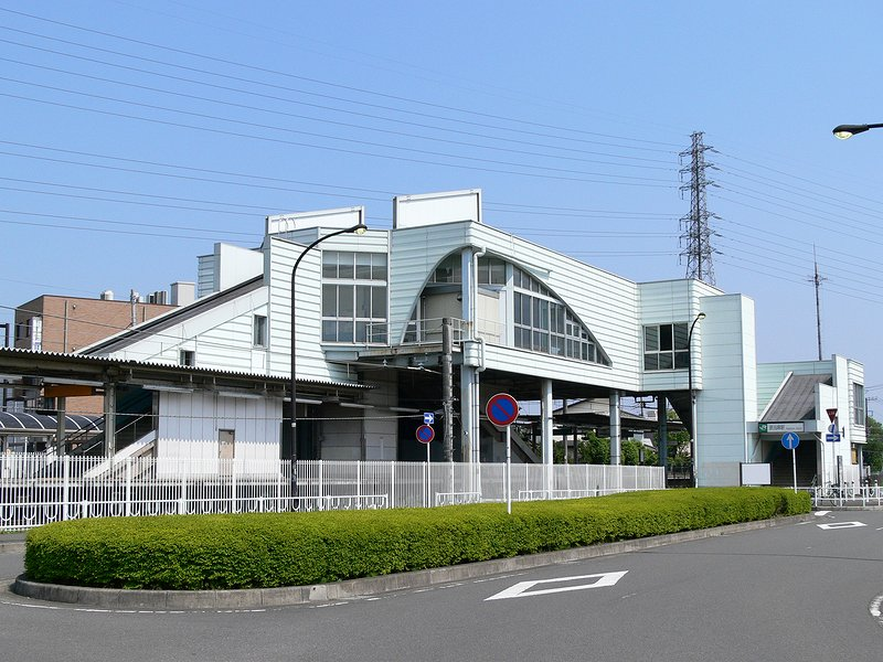 Harataima Station on JR Sagami Line, Sagamihara, Kanagawaja:原当麻駅